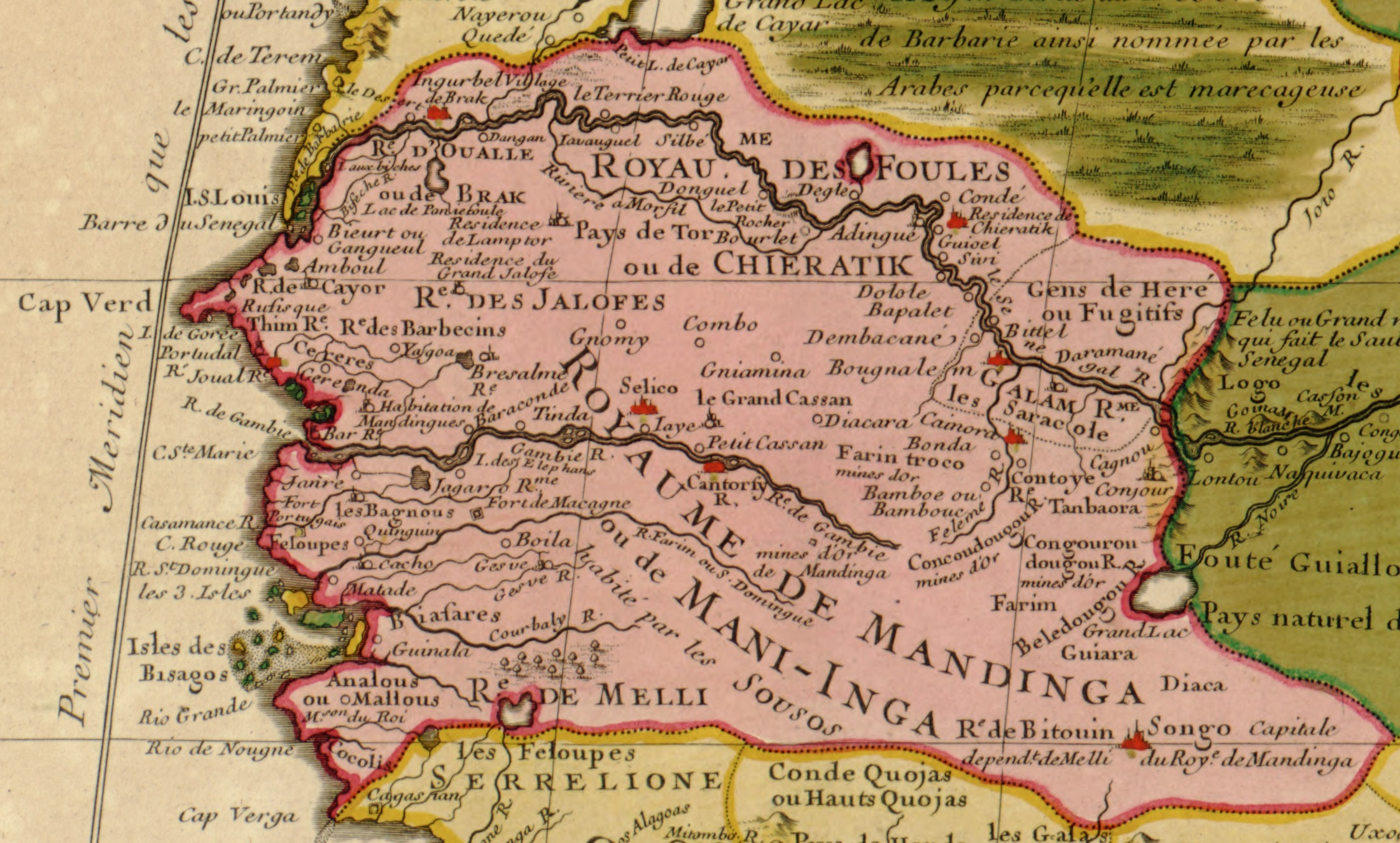 Part of North West Africa (original title: Carte de la Barbarie de la Nigritie et de La Guinee)